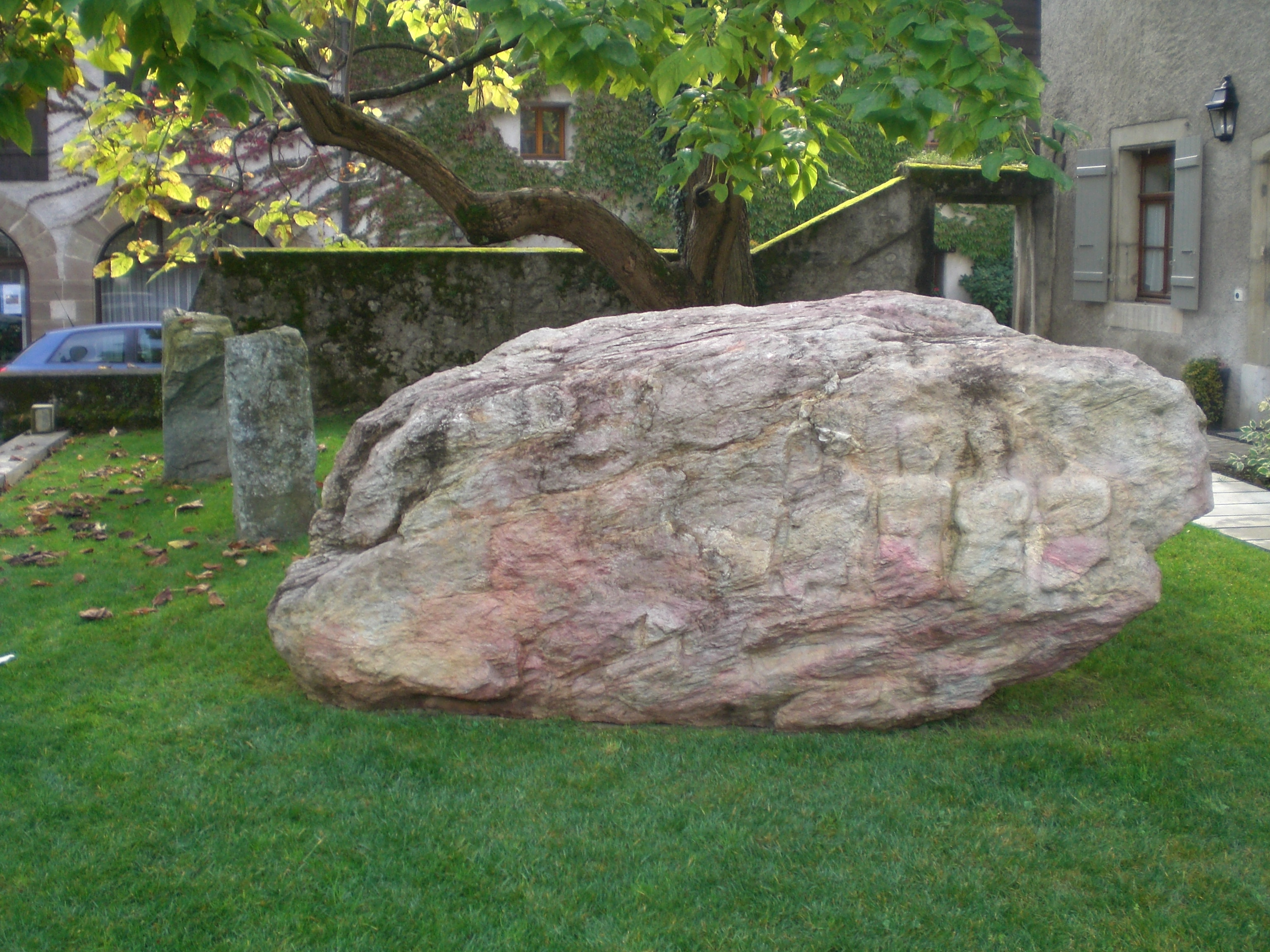 La Pierre aux Dames de Troinex